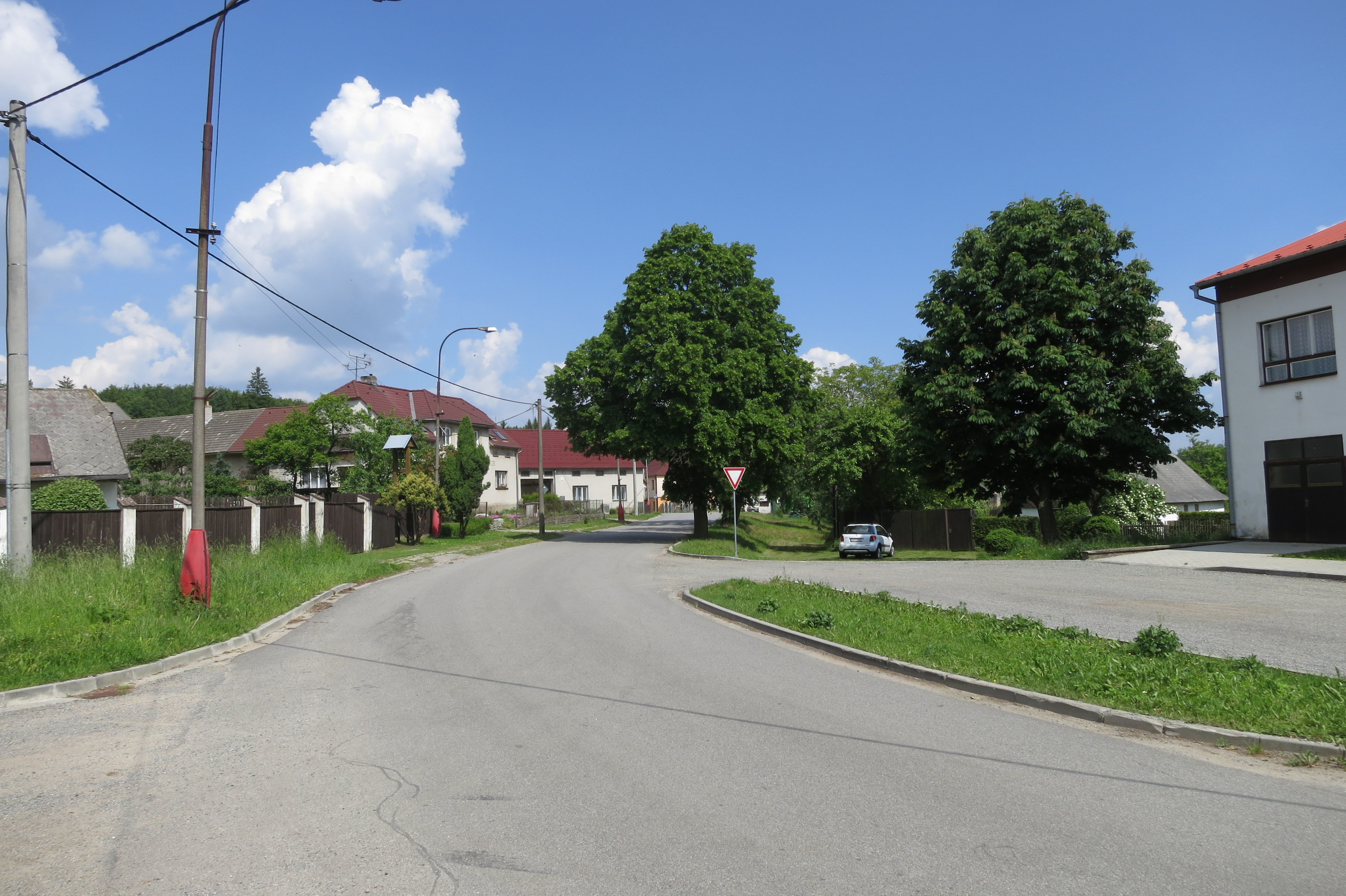 Centrum Bítovánek, okr. Třebíč